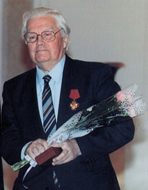 МОСКВА, КРЕМЛЬ. Вручение государственных наград.